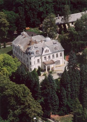 Zákányfalu (before Zákány), Hungary, aerialphotgraphy (Zichy Mansion)